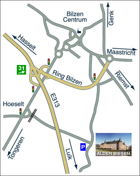 Routeplan Alden Biesen; tekening gemaakt en in het publieke domein geplaatst door Willy Leenders